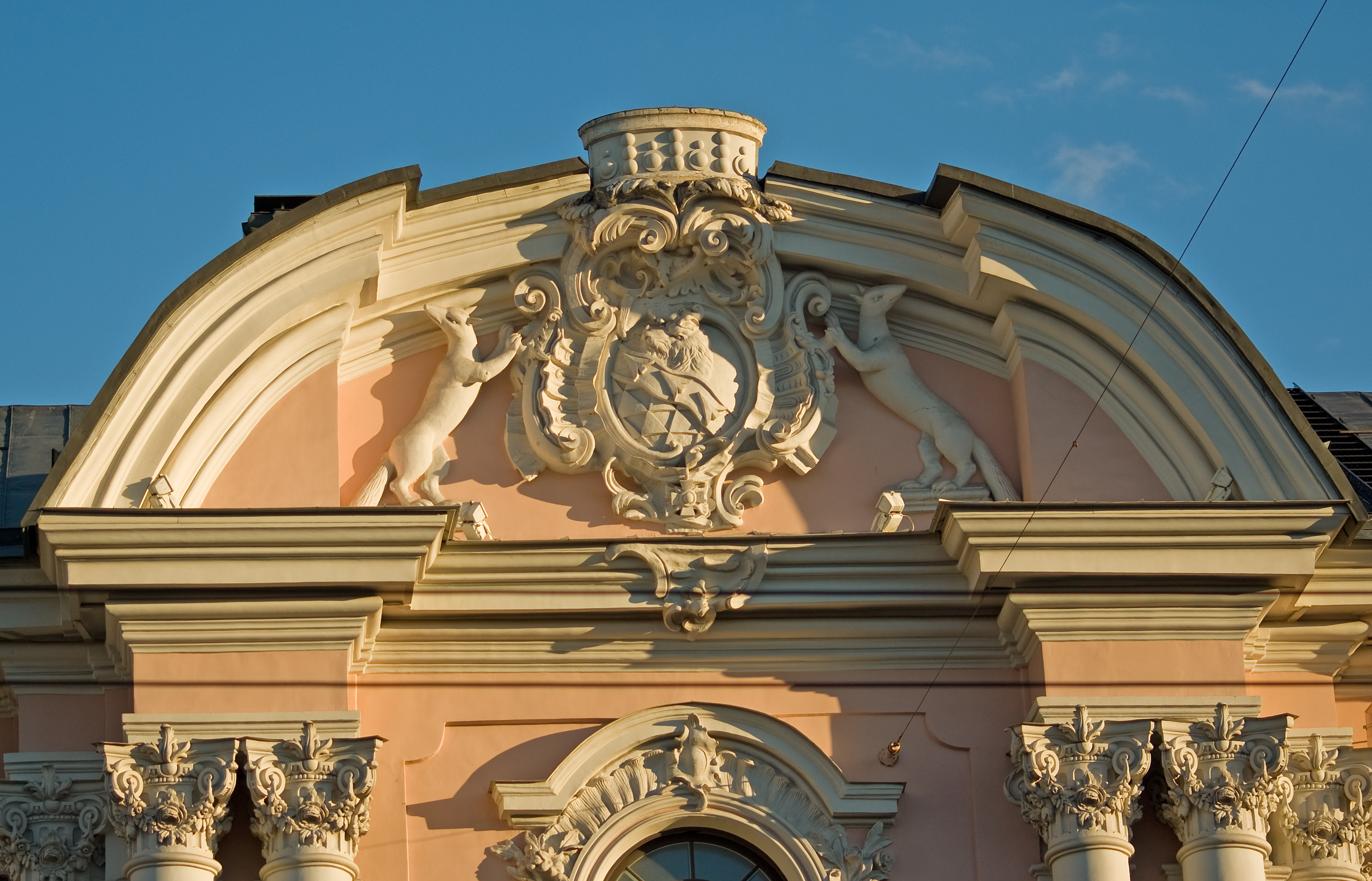 Строгановский дворец, Санкт-Петербург. Центральная финтифлюшка. (Вид с Невского)